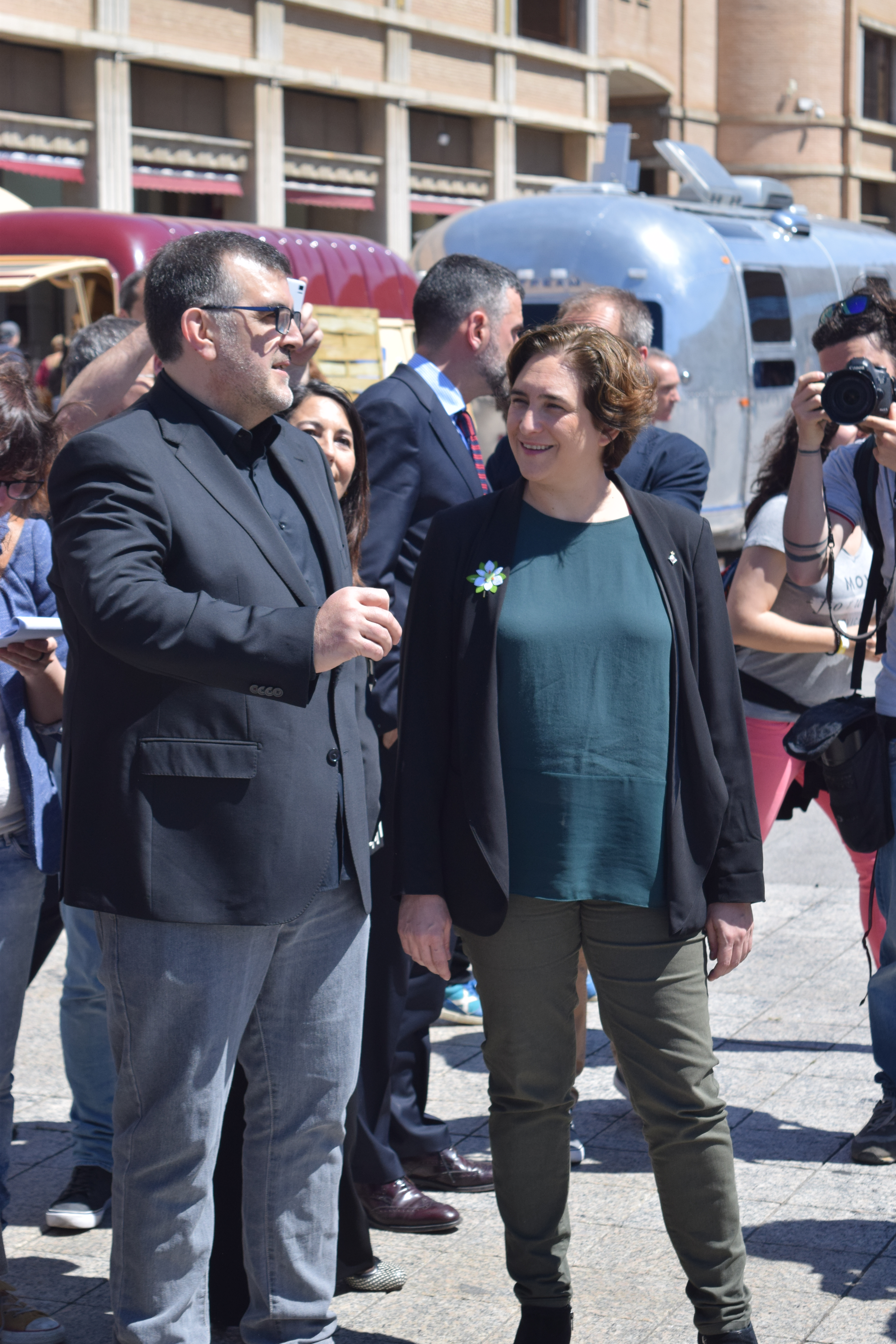 L'alcaldessa de Barcelona Ada Colau conversant amb Carles Santamaría al 34è Saló Internacional del Còmic de Barcelona (2016).